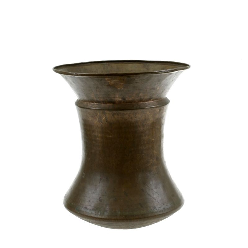 Ketel. Voor de bereiding van rijst. De ketel wordt met water gevuld en op een aardewerken komfoor (anglo) geplaatst. De hete, opstijgende damp stoomt de rijst gaar in een kegelvormige mand (kukusan) die in de halsopening van de ketel rust.. Roodkoperen rijststoomketel Unknown language: Dandang